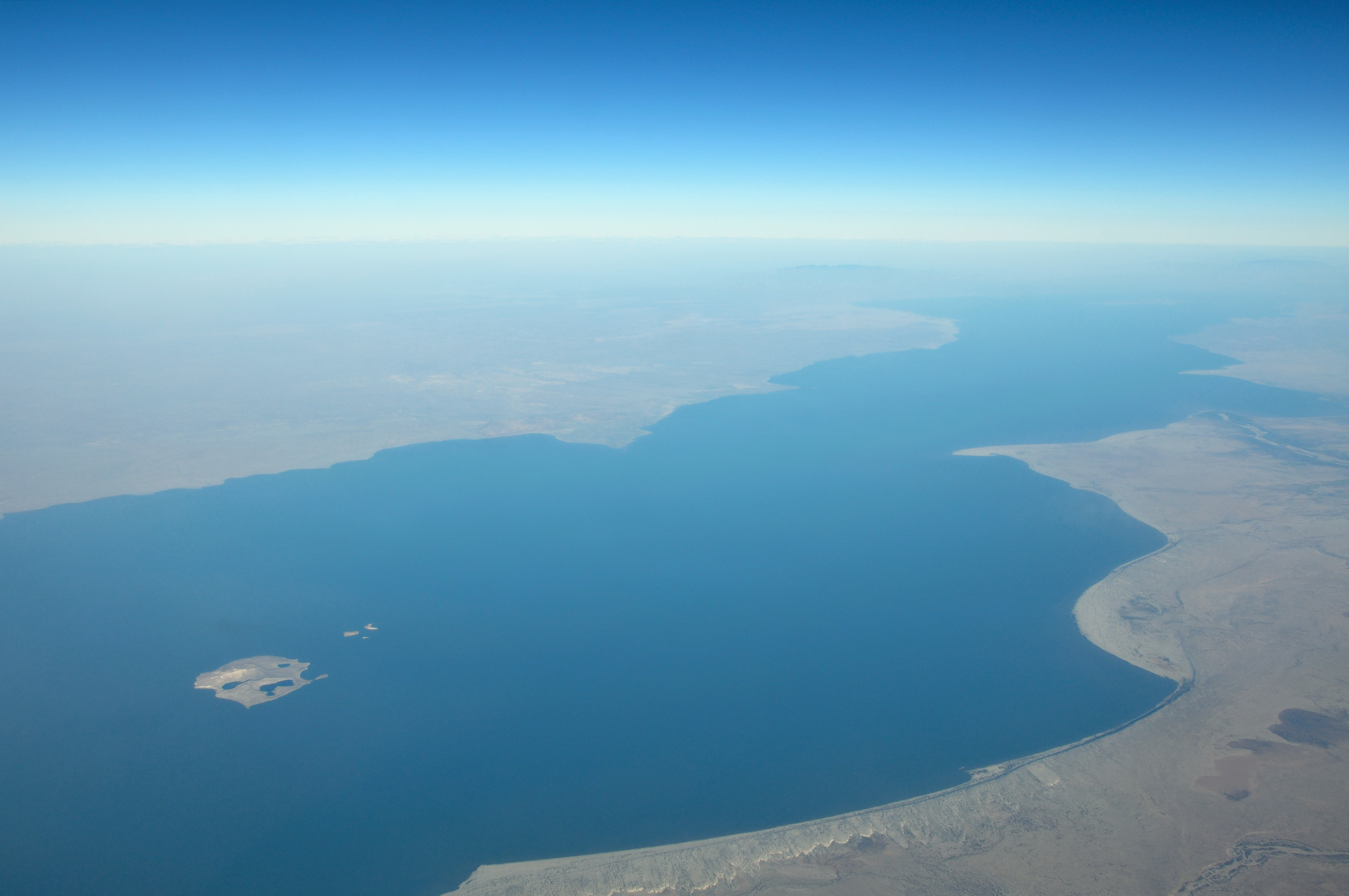 Kenya, Lake Turkana